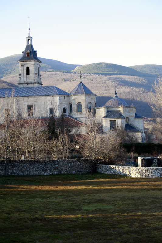 Monasterio de El Paular, Madrid / El Paular Monastery, Madrid